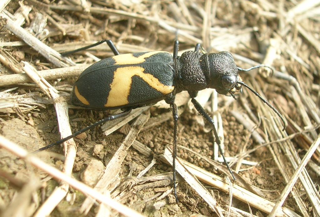 Cicindela aurofasciata from Brahmagiris, Coorg